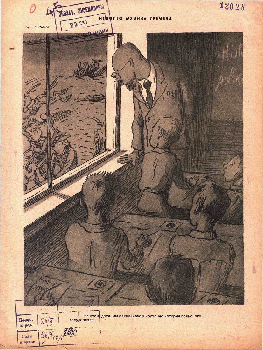 Caricature soviétique sur l'occupation de la Pologne par la Wehrmacht et l'Armée rouge. Publiée dans le n° 28 du journal satirique « Crocodile » («Крокодил»), en 1939, selon le site d'information biélorusse Белрынок. Le texte dit : « LE CHANT DU CYGNE A SONNÉ. Sur ce, les enfants, nous terminons l'étude de l'histoire de l'État polonais ».